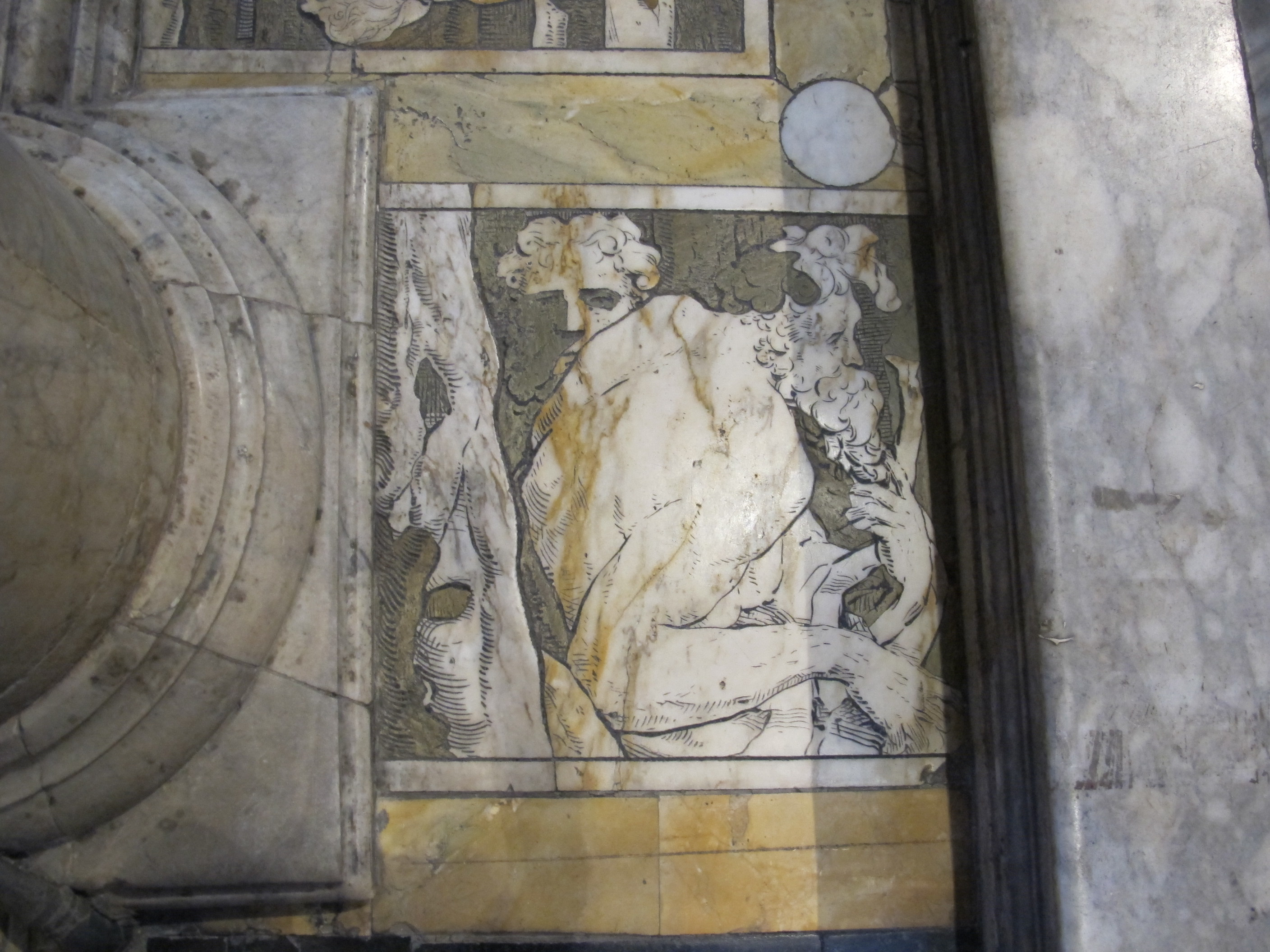 Beccafumi, fregio dell'altare